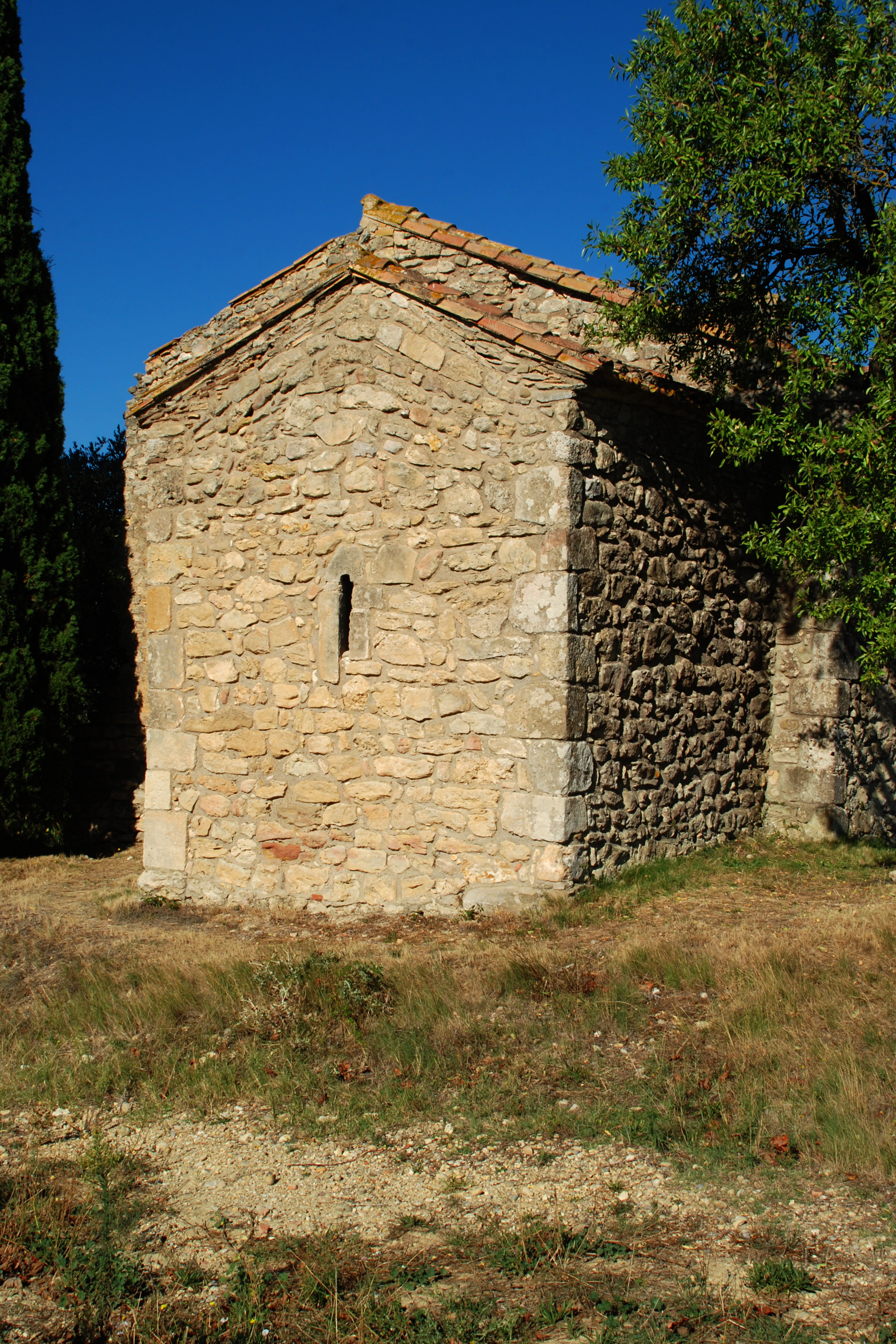 France - Languedoc - Aude - Moussan - chapelle Saint-Laurent (préroman) - chevet carré